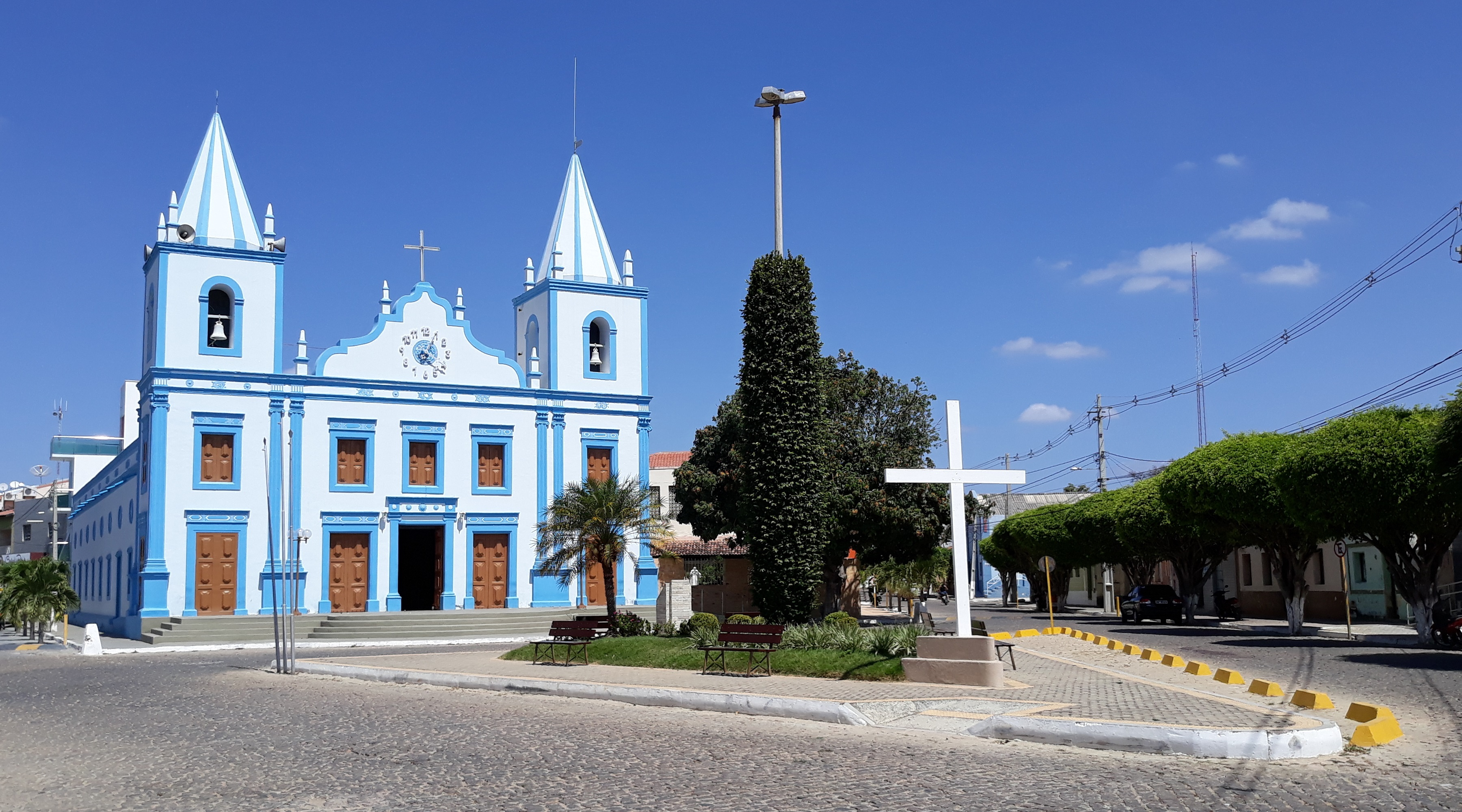 Português do Brasil: Igreja Matriz de Nossa Senhora da Conceição, da Diocese de Santa Luzia de Mossoró, em Martins, Rio Grande do Norte (Brasil). À frente, o Largo Mozart Diógenes.